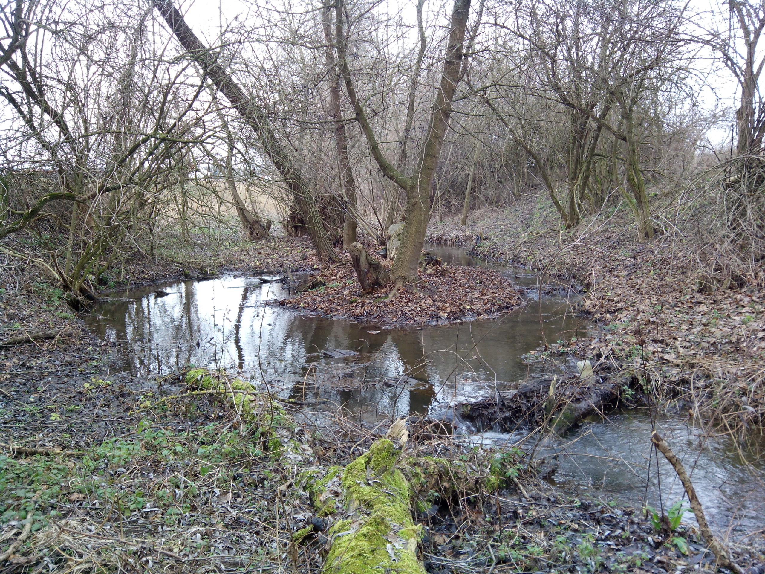 Únanovka - úsek mezi Těšeticemi a Banticemi